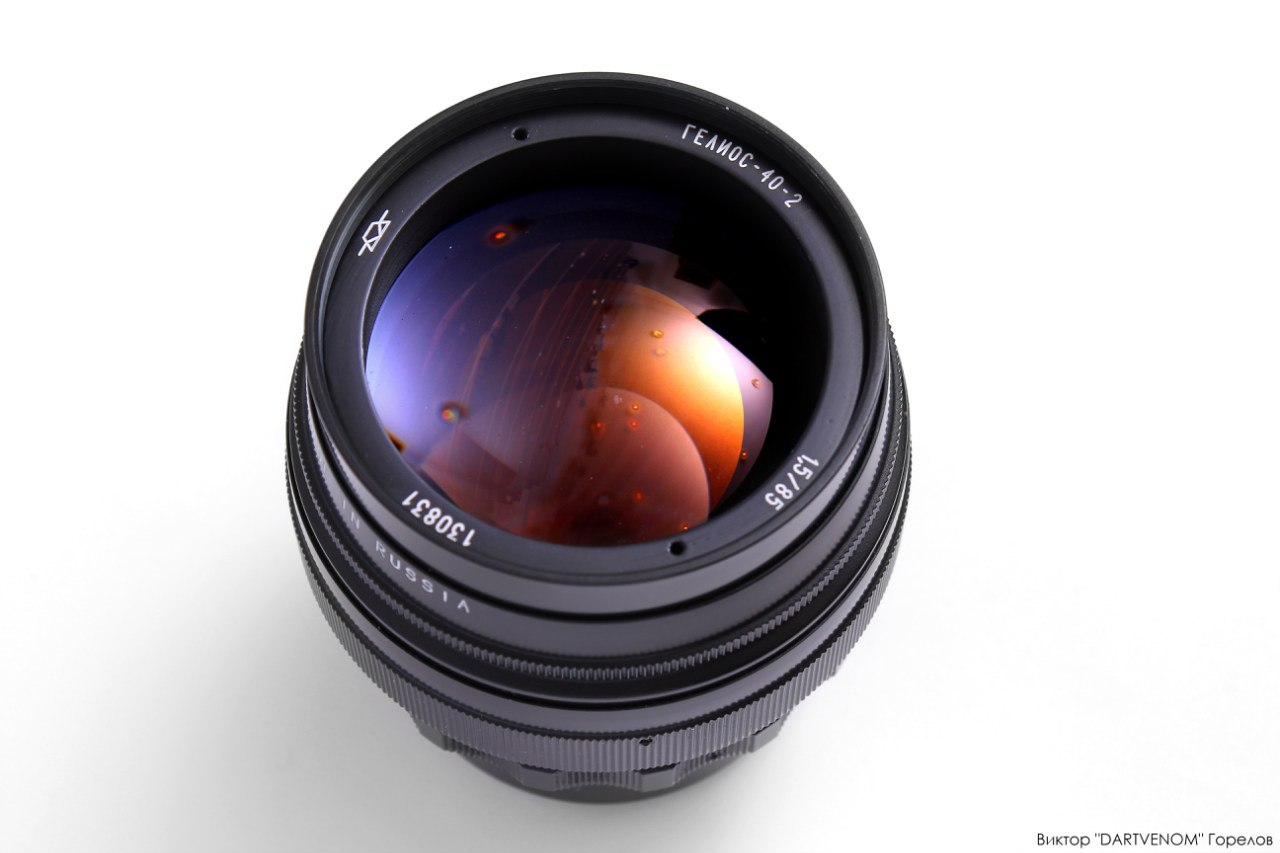 Объектив «Гелиос-40-2»